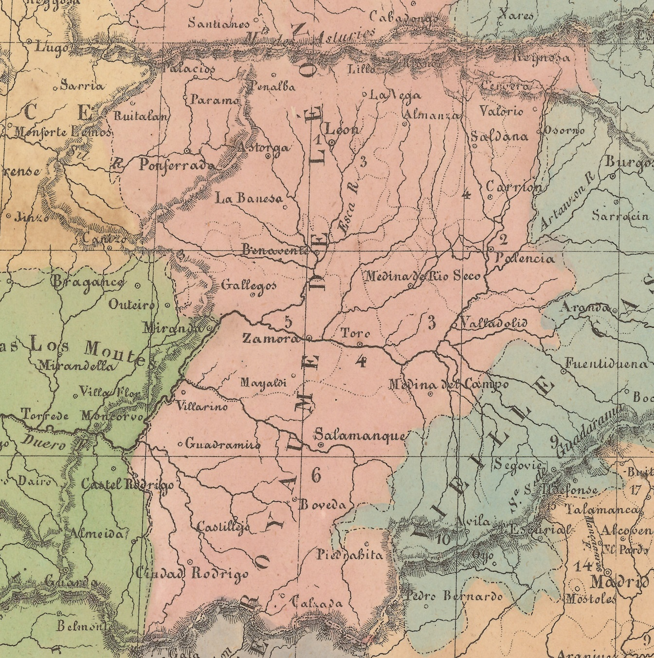 Detalle del Reino de León en el mapa "Espagne et Portugal", realizado por H. Selves y publicado por P. Bineteau en 1822